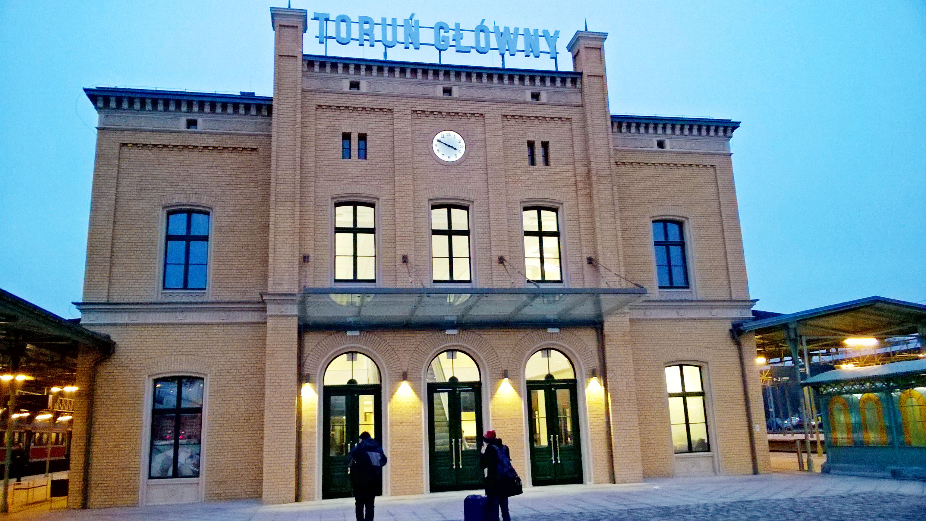 Toruń Główny listopad 2015